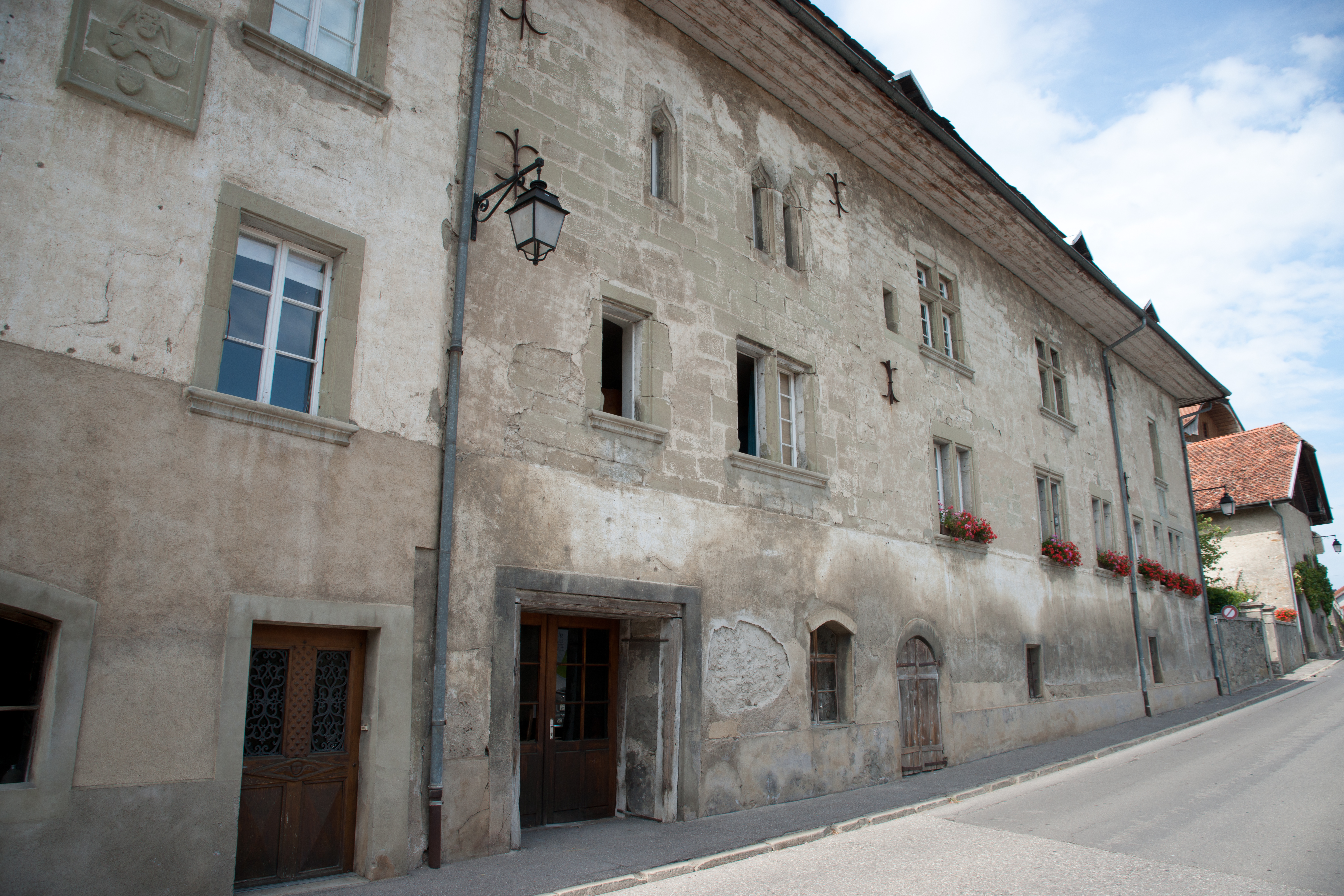 Maison de Maillardoz de Prez